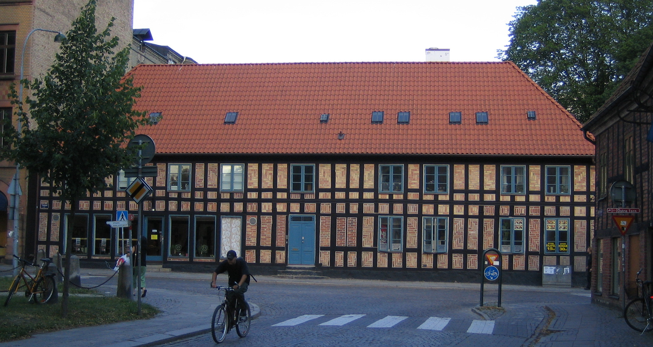 Wickmanska gården, rebuilt after a fire, in Lund, Sweden